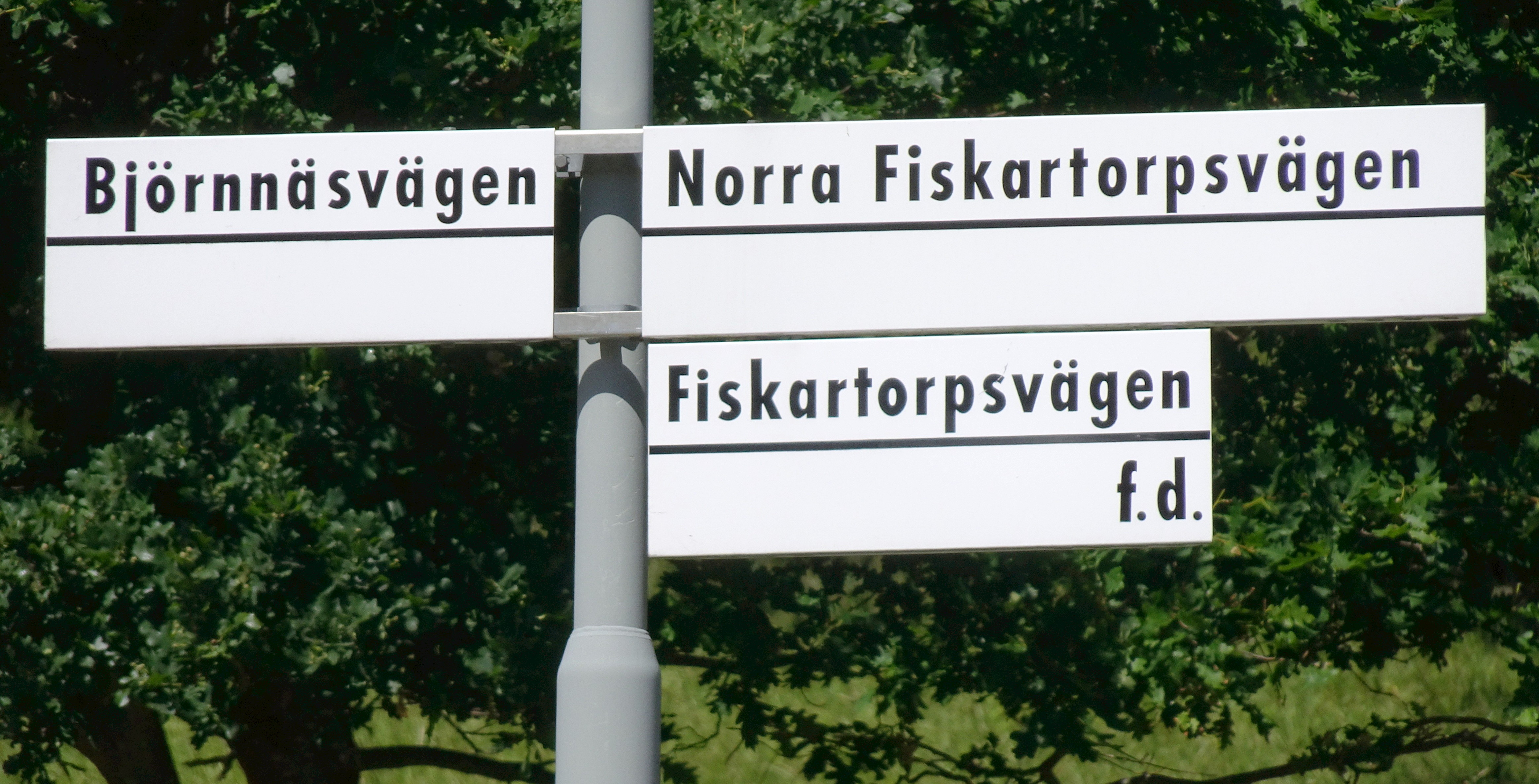 Björnnäsvägen / Fiskartorpsvägen